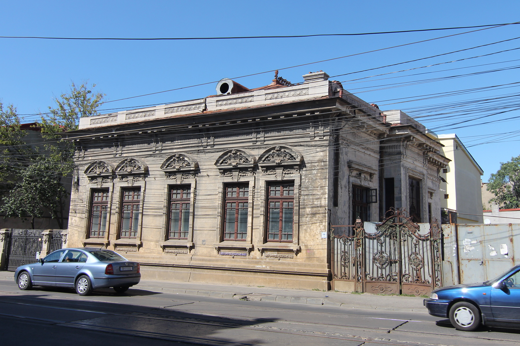 Casă pe Calea Călărașilor